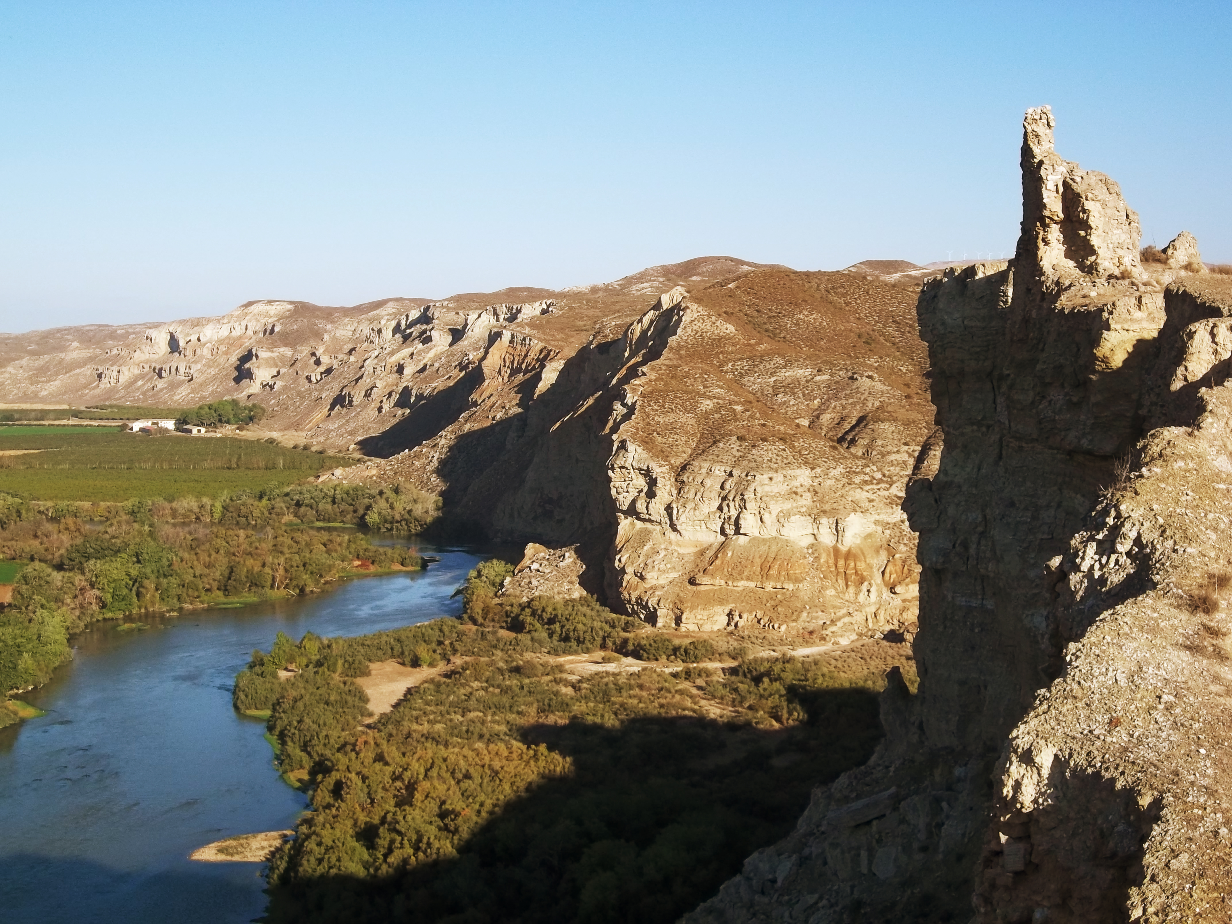 Ruinas de la antigua villa medieval al borde del precipicio.